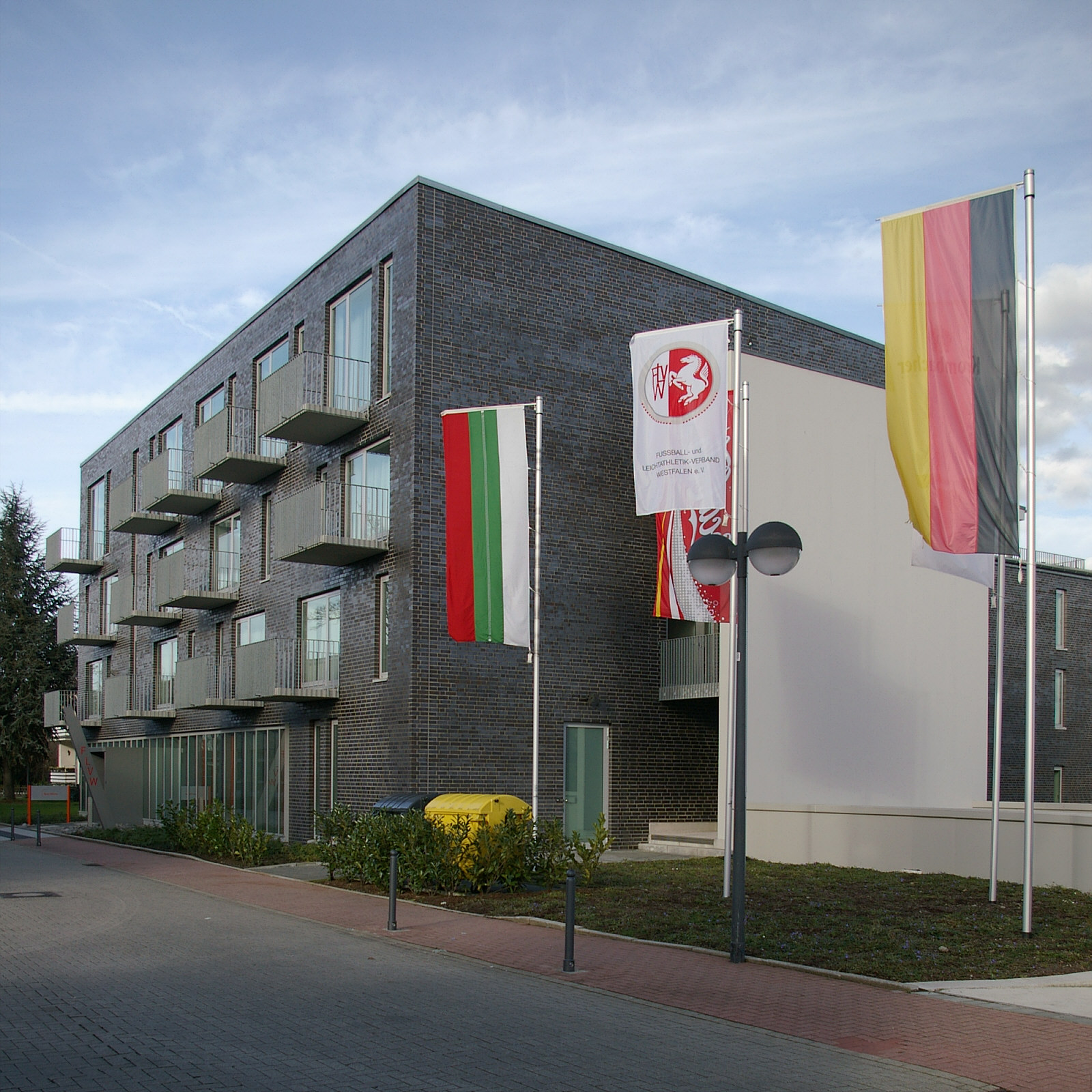 SportCentrum Kaiserau des Fußball- und Leichtathletikverbandes Westfalen e.V., Sporthotel